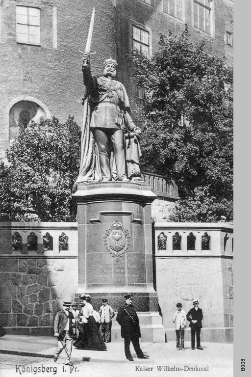 Kaiser Wilhelm I Denkmal von Friedrich Reusch auf dem Kaiser Wilhelms Platz in Königsberg